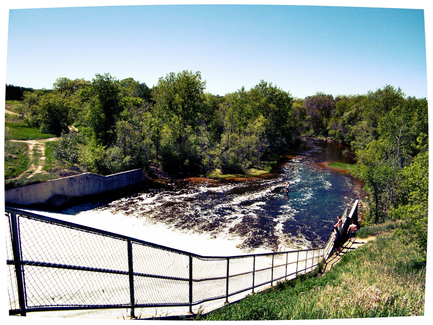 déversoir du parc provincial Saint-Malo